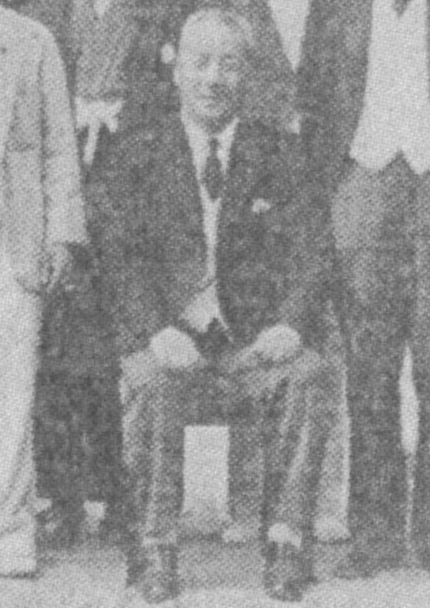 Mizutani Masajirō (Japanese, *1877, †1950)